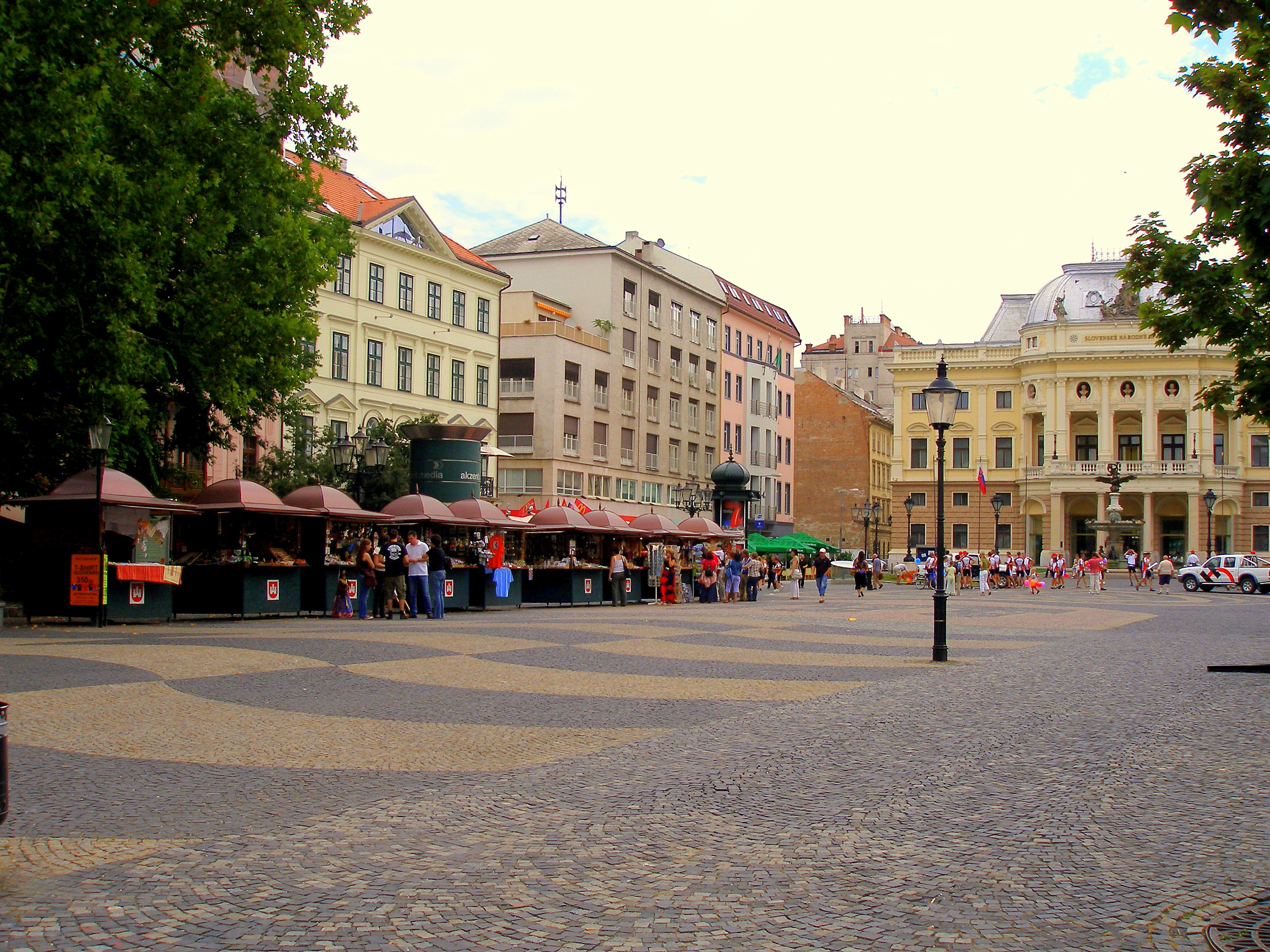 Hviezdoslavovo námestie v Bratislave